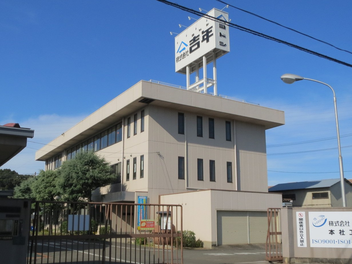 河内長野市にある吉年